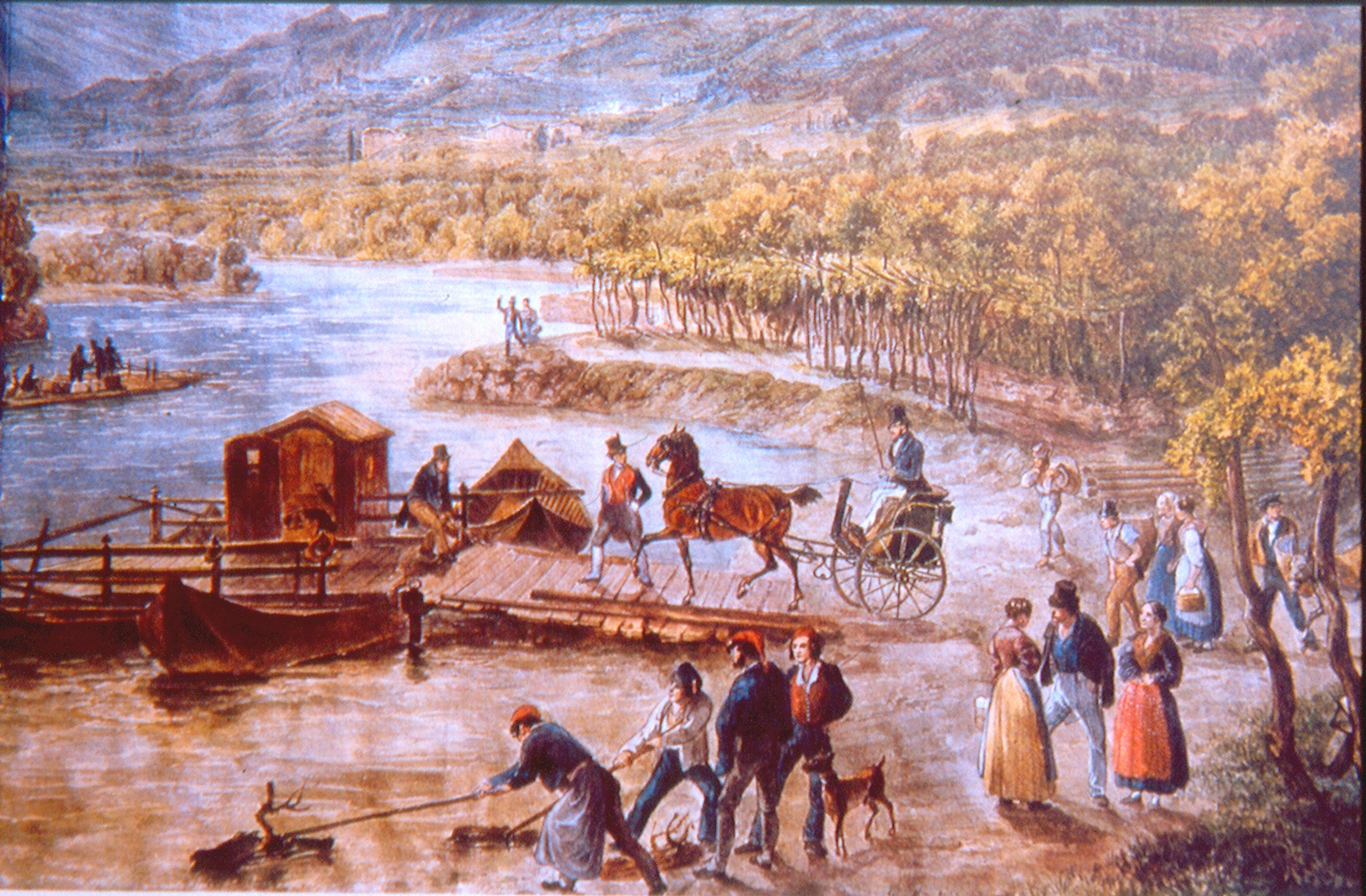 Acquerello. Il porto di Villa Lagarina sul fiume Adige (particolare di un'opera conservata a Palazzo Moll di Villa Lagarina)